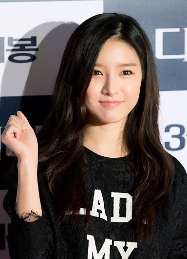 140219-다이애나-VIP시사회김소은